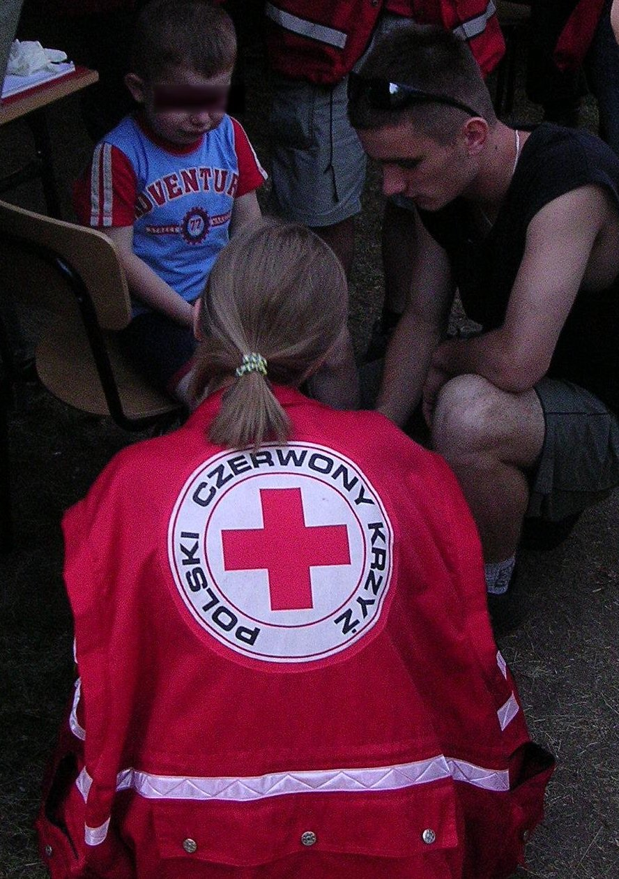 Ratownik PCK z Grupy SIM Tomaszów Maz. udziela pierwszej pomocy dziecku